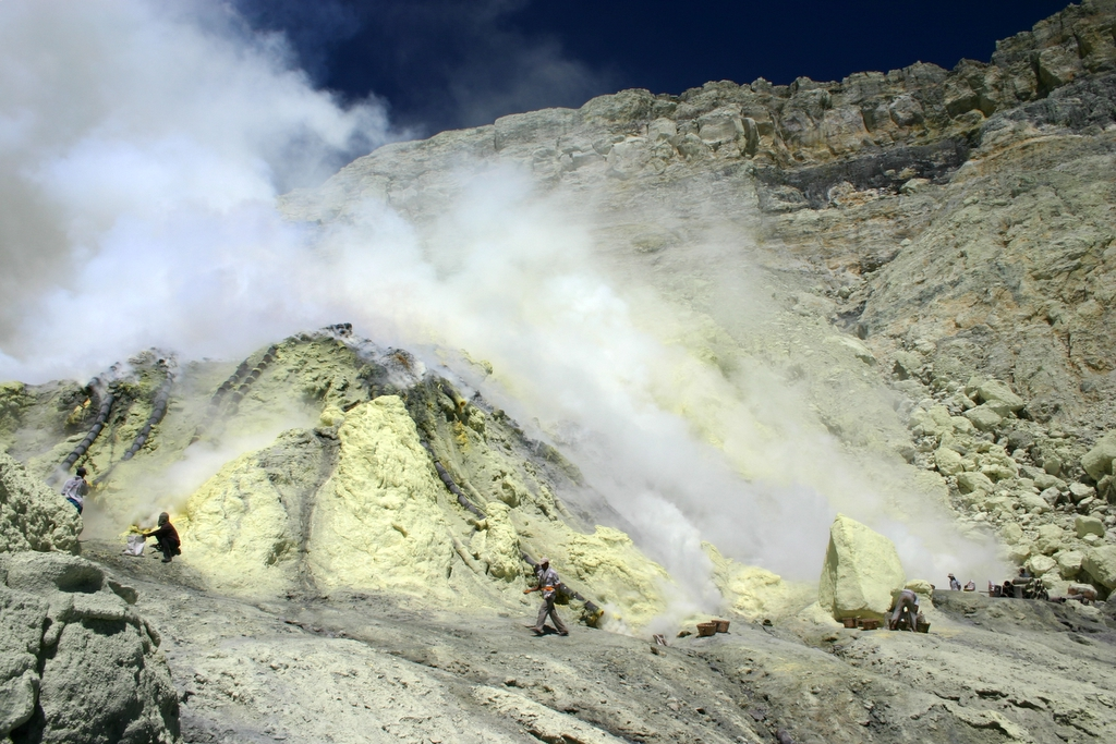 Sulfur mining operation at Kawah Ijen, Java Indonesia.